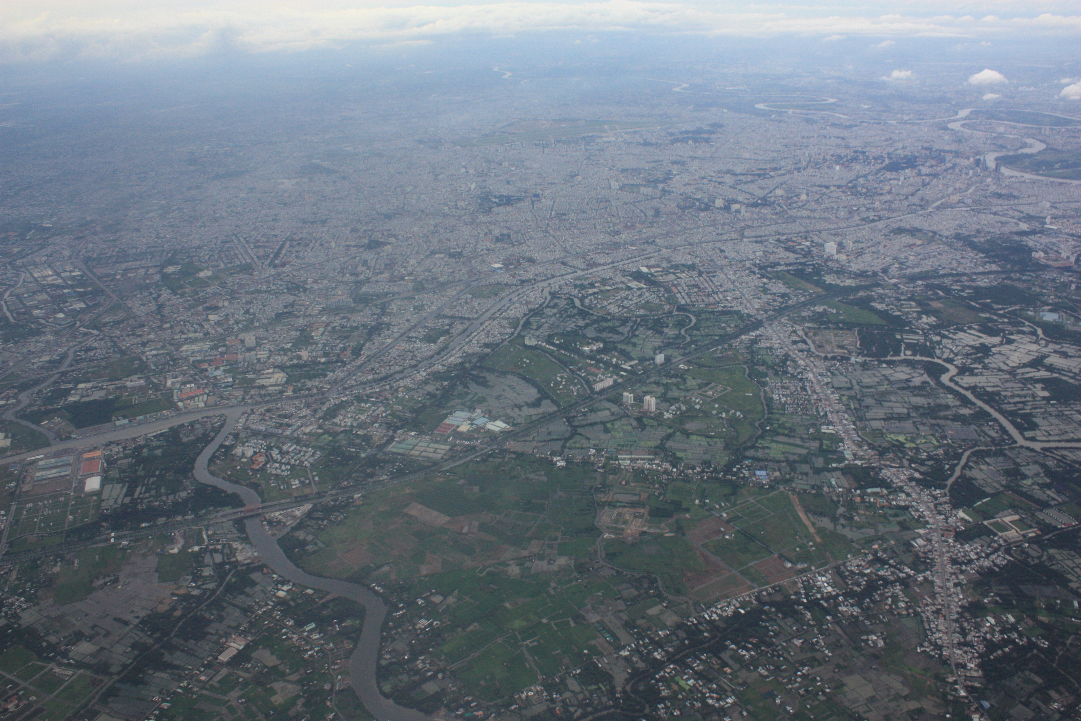 Hô-Chi-Minh-Ville vu depuis un avion de VietJet Air en décollage pour Nha Trang.